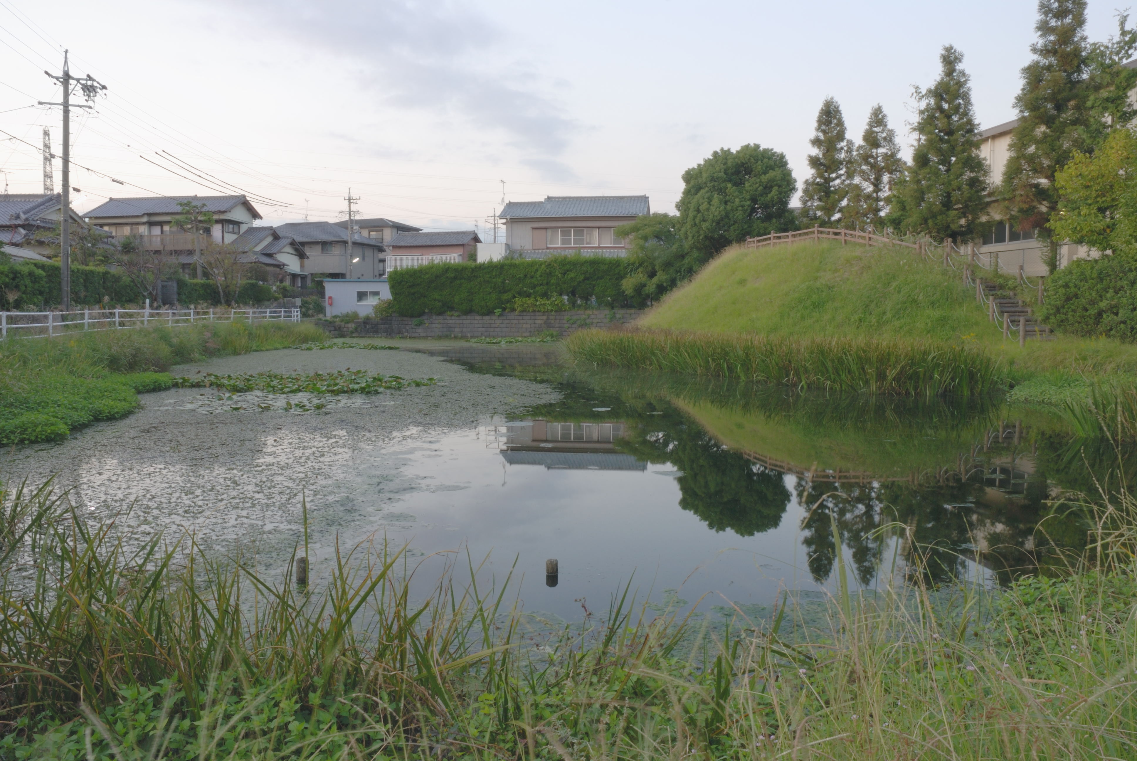 Sannomaru hori